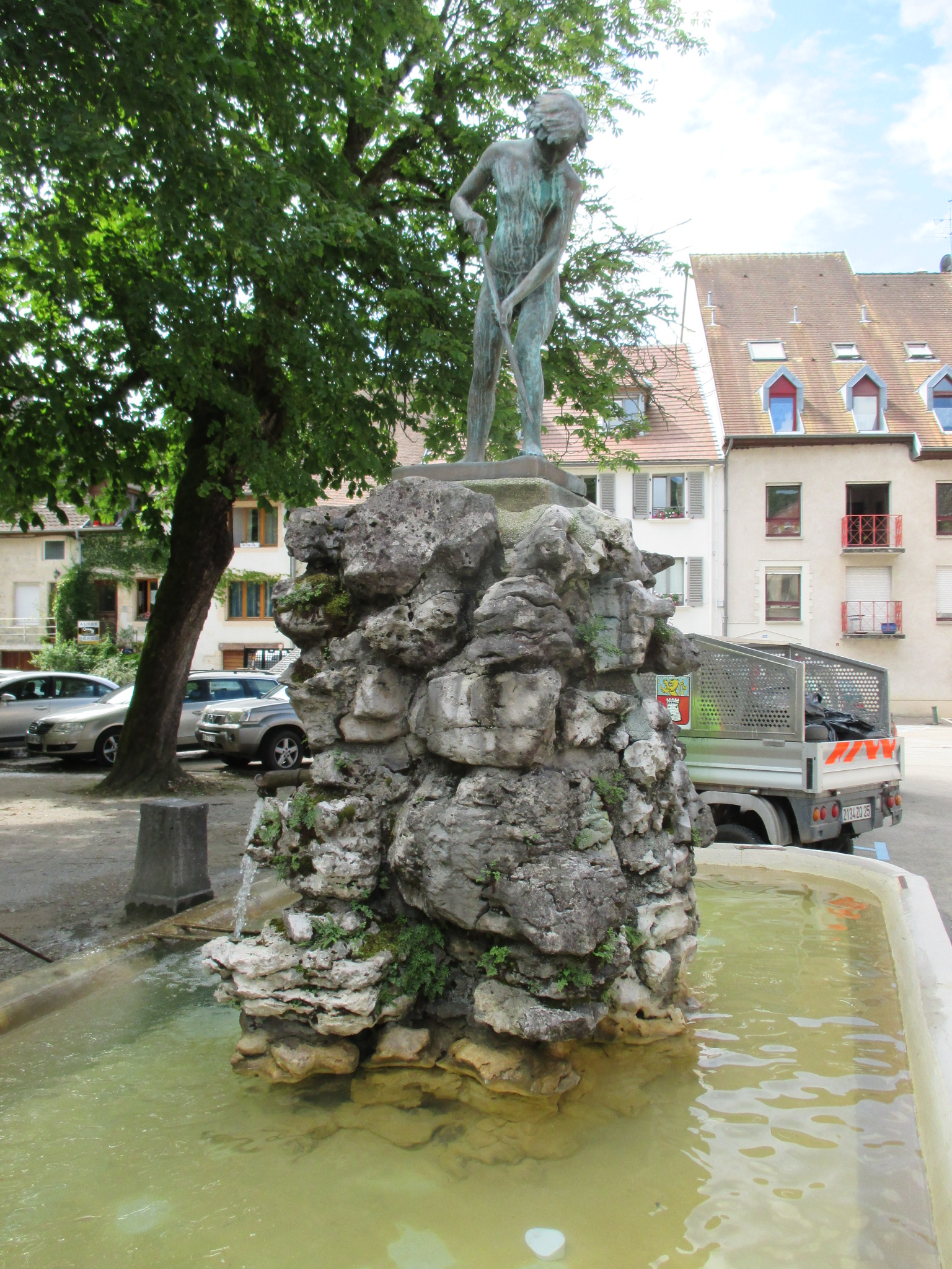 Le Pêcheur de chavots, place Gustave Courbet à Ornans, bronze , première sculpture de Gustave Courbet en 1862 (enfant pécheur au harpon de chavots / chabots (poisson de rivière)